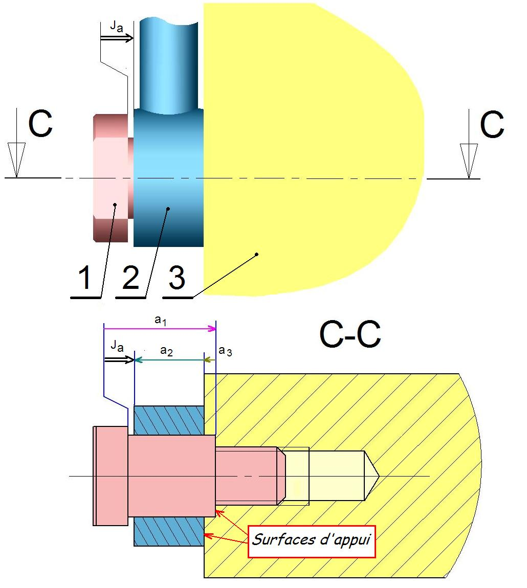 Image réalisée sous SolidWorks et MS Paint.